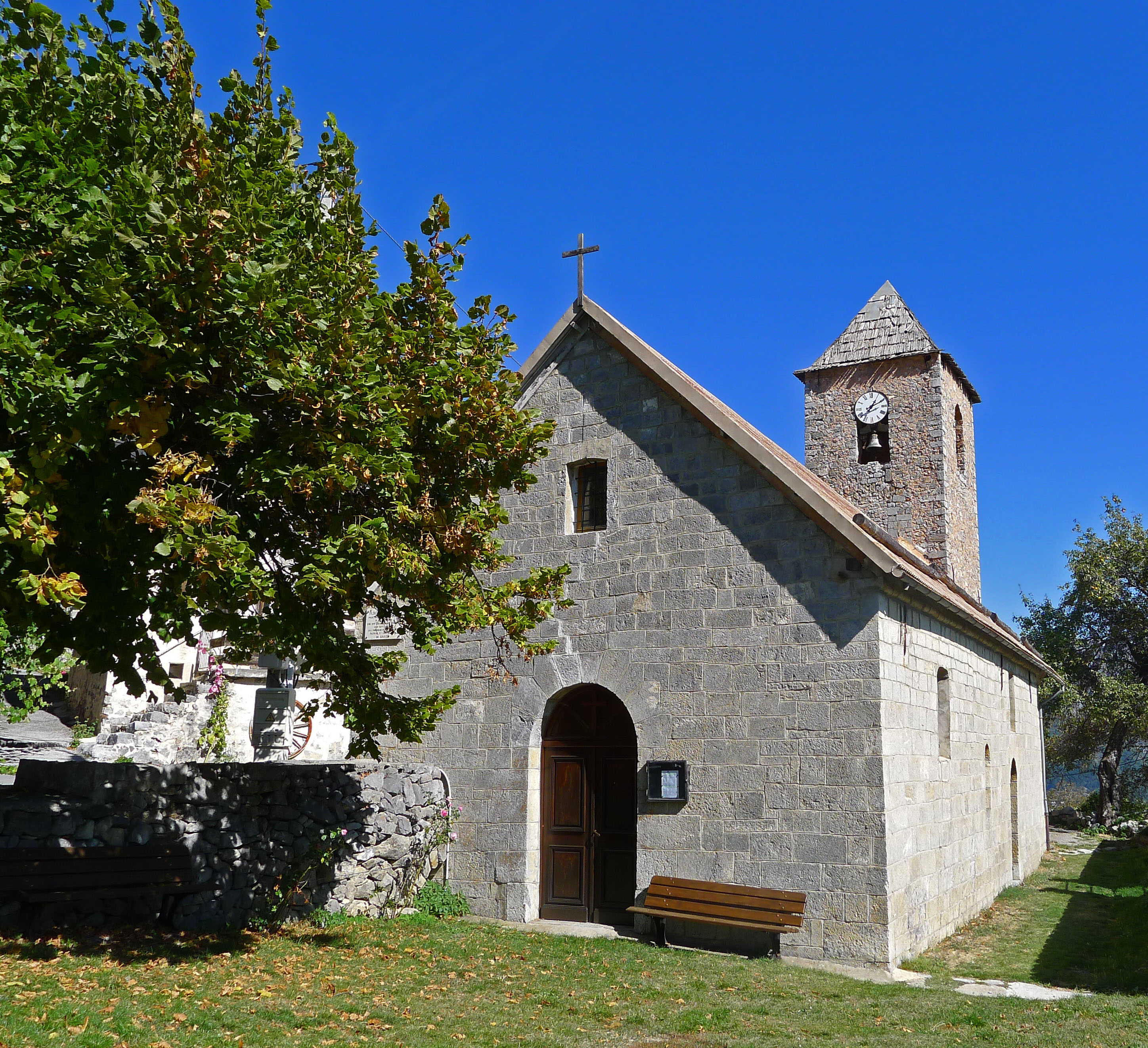 L'église de Sauze